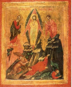 Icône roumaine Musée d'Art Bucarest public domain